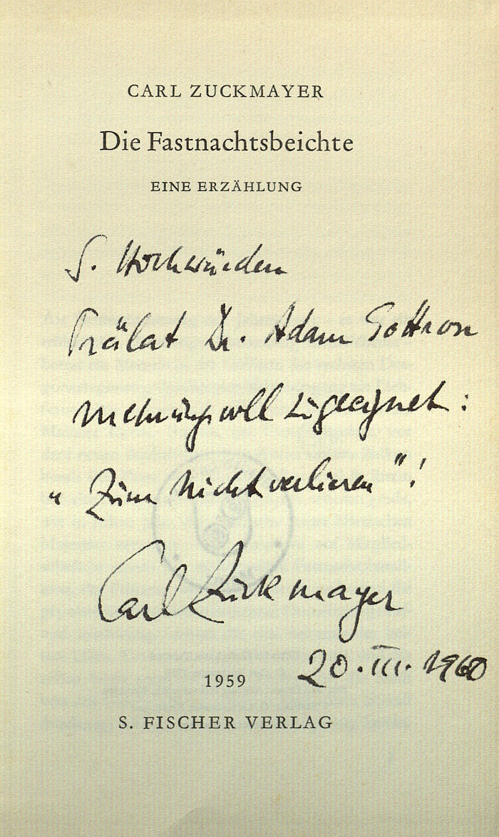 Titelblatt: Die Fastnachtsbeichte : eine Erzählung / Carl Zuckmayer. [Erstausg.], 11. - 15. Tsd. Frankfurt am Main: S. Fischer, 1959. Mit handschriftlicher Widmung des Autors für Adam Gottron. Wissenschaftliche Stadtbibliothek Mainz. Signatur: 55/9541